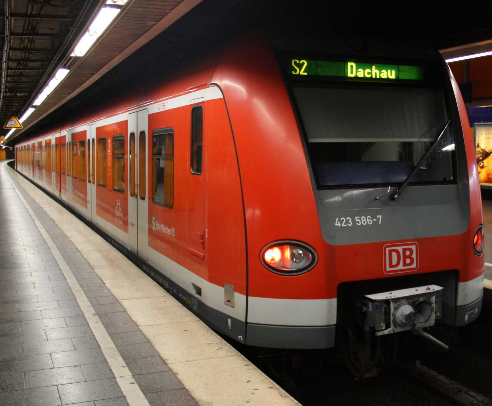 S-Bahn (S 2 Dachau) an der Station Marienplatz in München